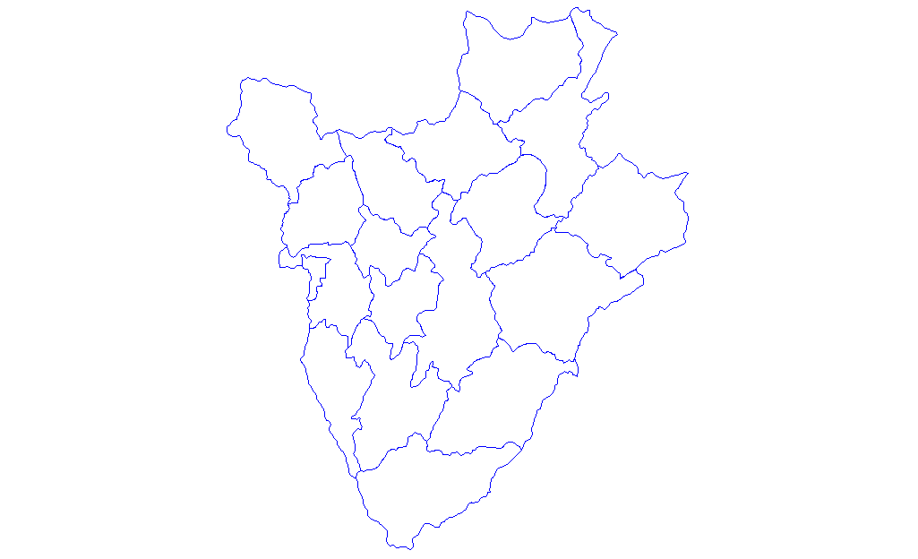 ブルンジの行政区画地図。